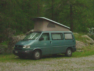 Volkswagen T4 camper.